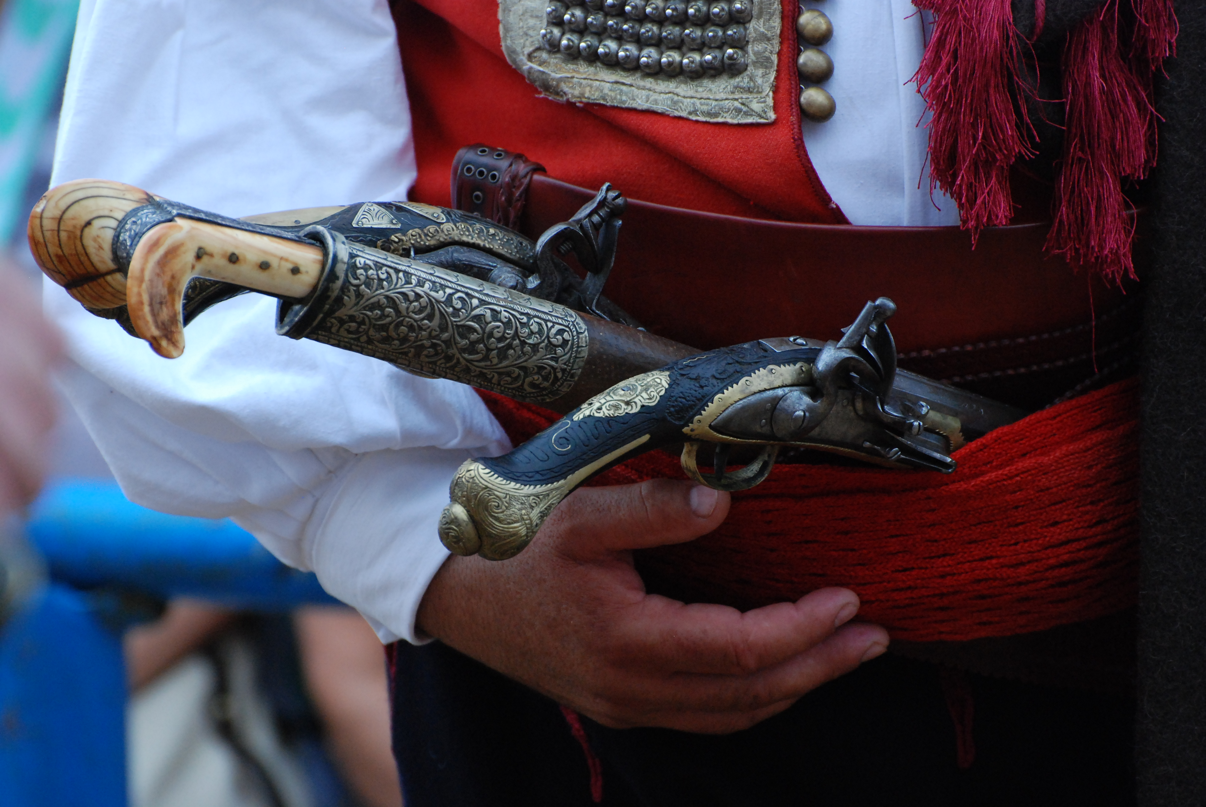 Oko pasa je crveni pojas i pripašnjača s ukrašenim fišeklijama. U pripašnjaču su zadjeveni dugi handžar, ili jatagan, i dvije kubure.